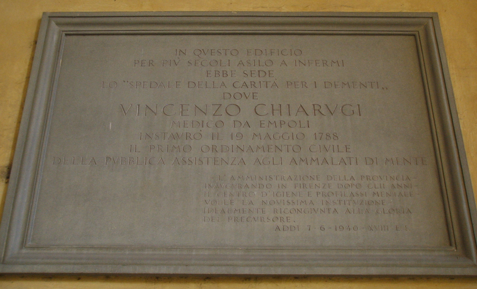 Ospedale bonifacio, targa vincezo chiarugi